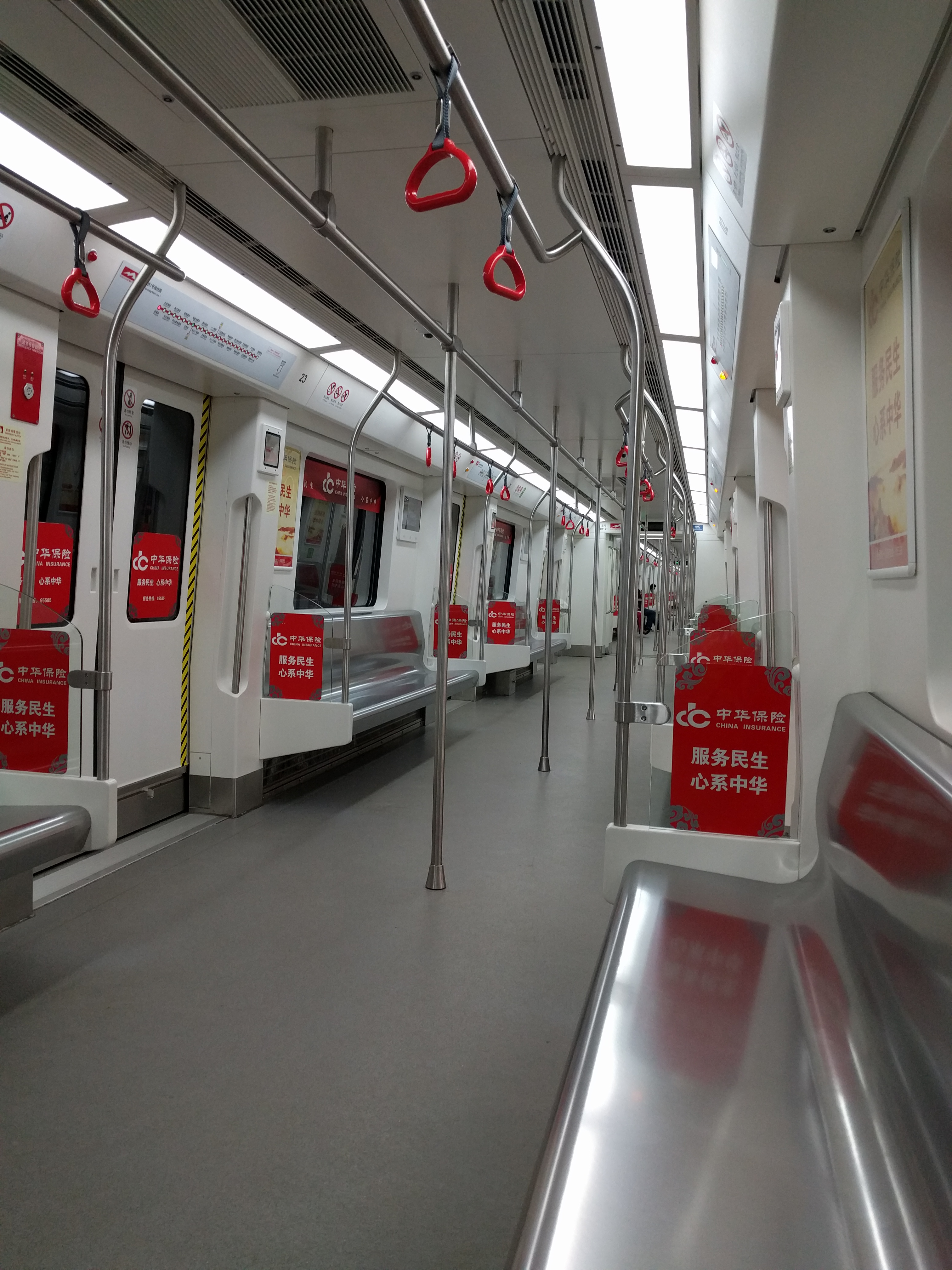 1号线列车